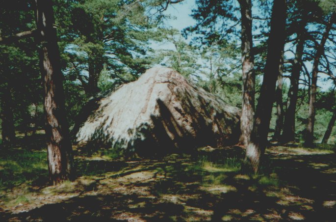 Big stone on Aegna (island of Estonia). Jeden z "Velkých kamenů" na ostrově Aegna.